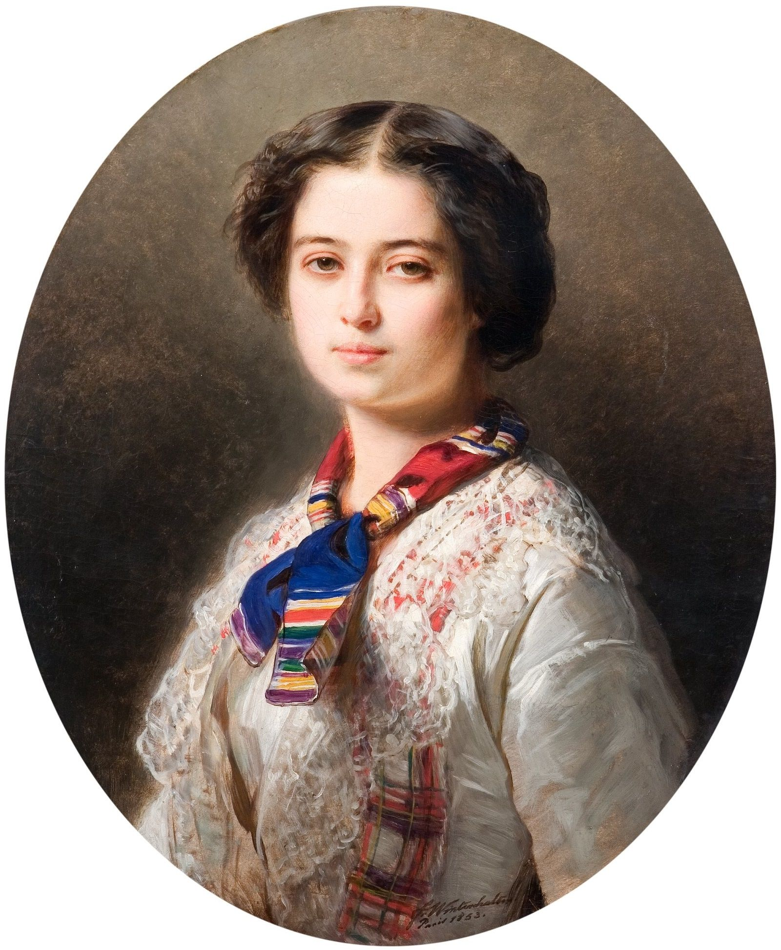 Portret Cecylii Lubomirskiej z Zamoyskich (1831-1904)